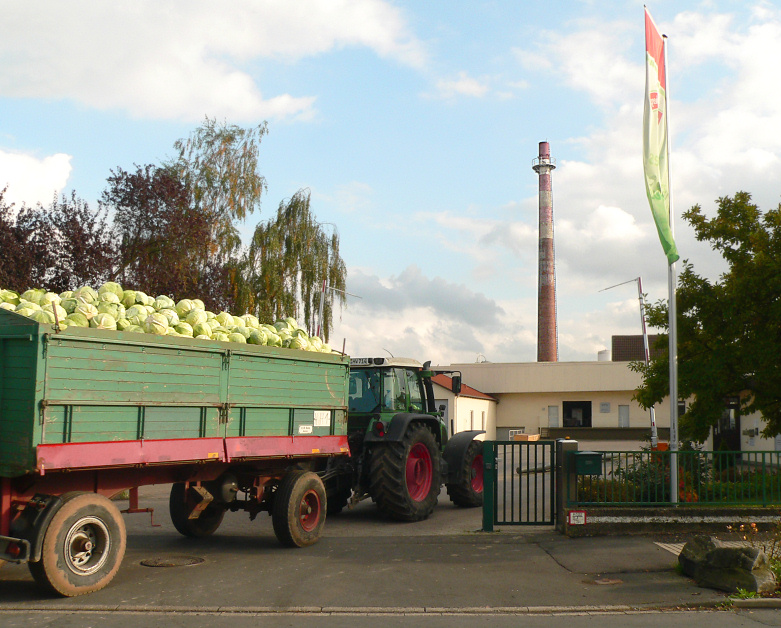 Hengstenberg Niederlassung Fritzlar